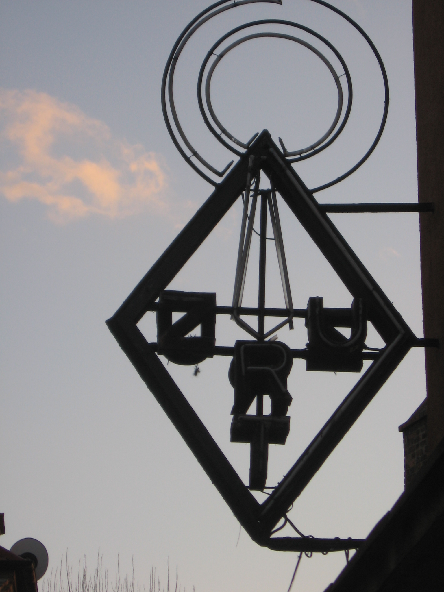 Zachowany do roku 2007 neon z logo firmy ZURiT. Zdjęcie wykonane w ciągu dnia, na w Wołowie przy ulicy Szkolnej